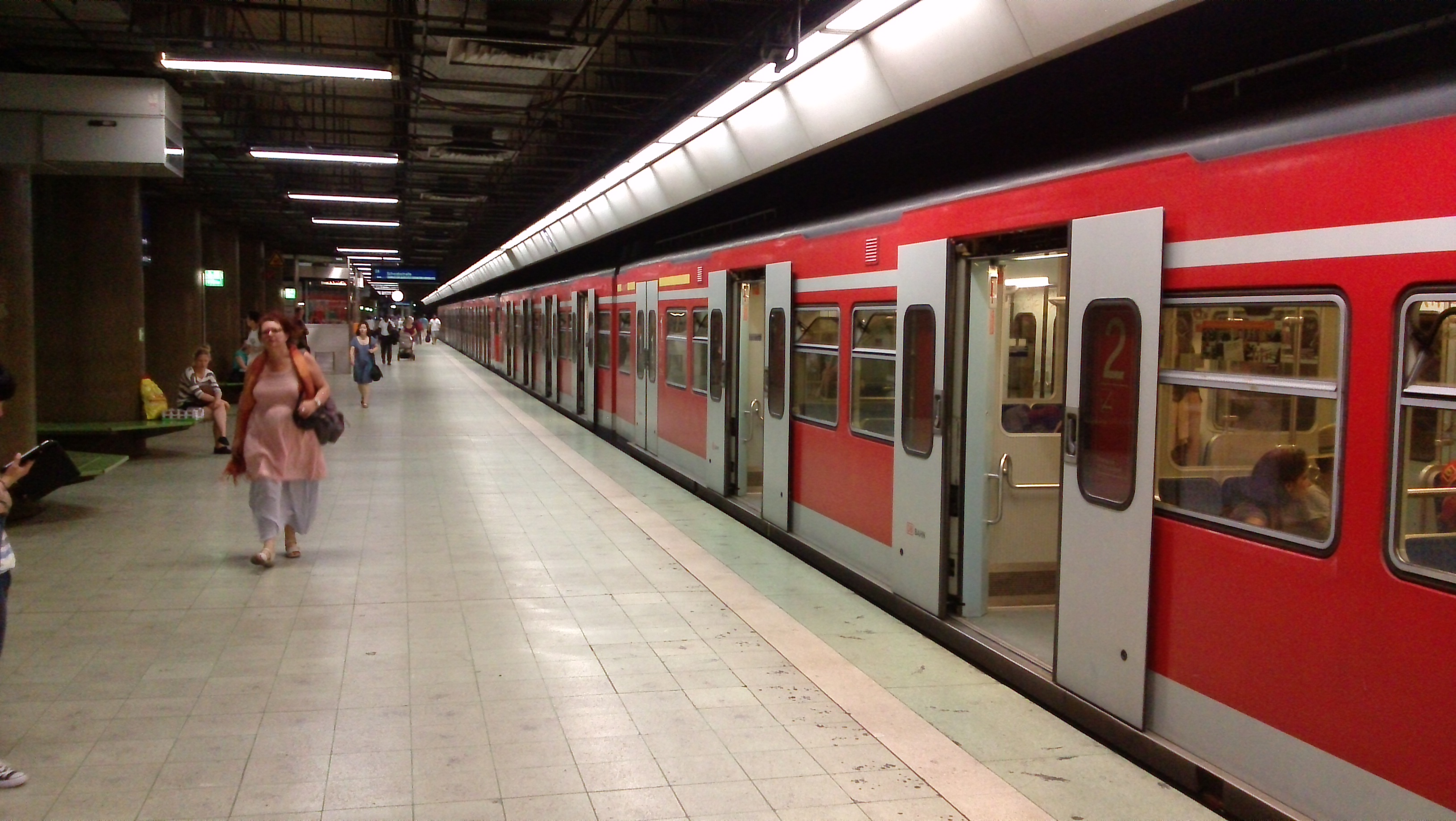 Příměstská železnice (S-Bahn) ve Stuttgartu, Německo